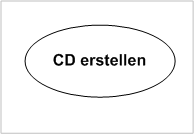 Anwendungsfall (UML2) - Beispiel 4